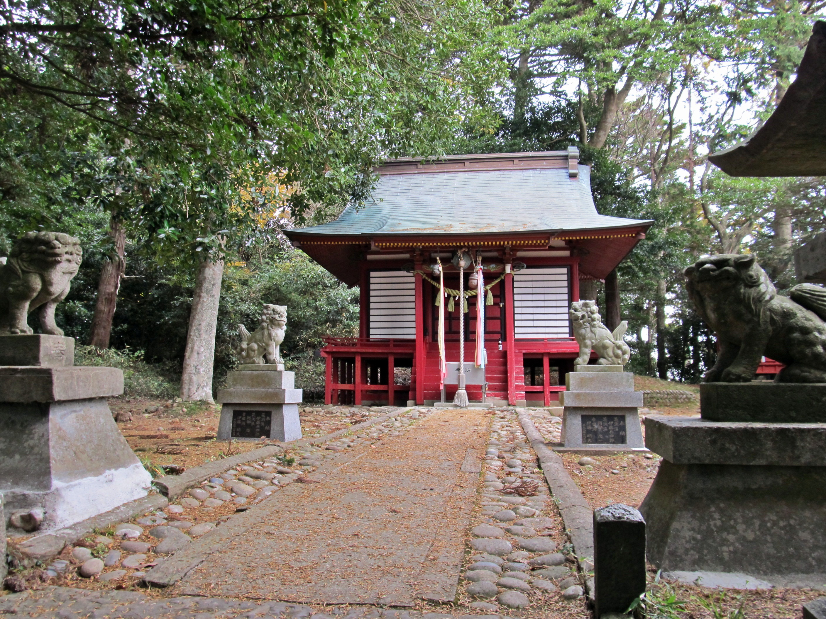 鼻節神社拝殿